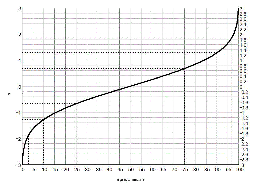 соответствие z-оценок и процентилей стандартного нормального распределения